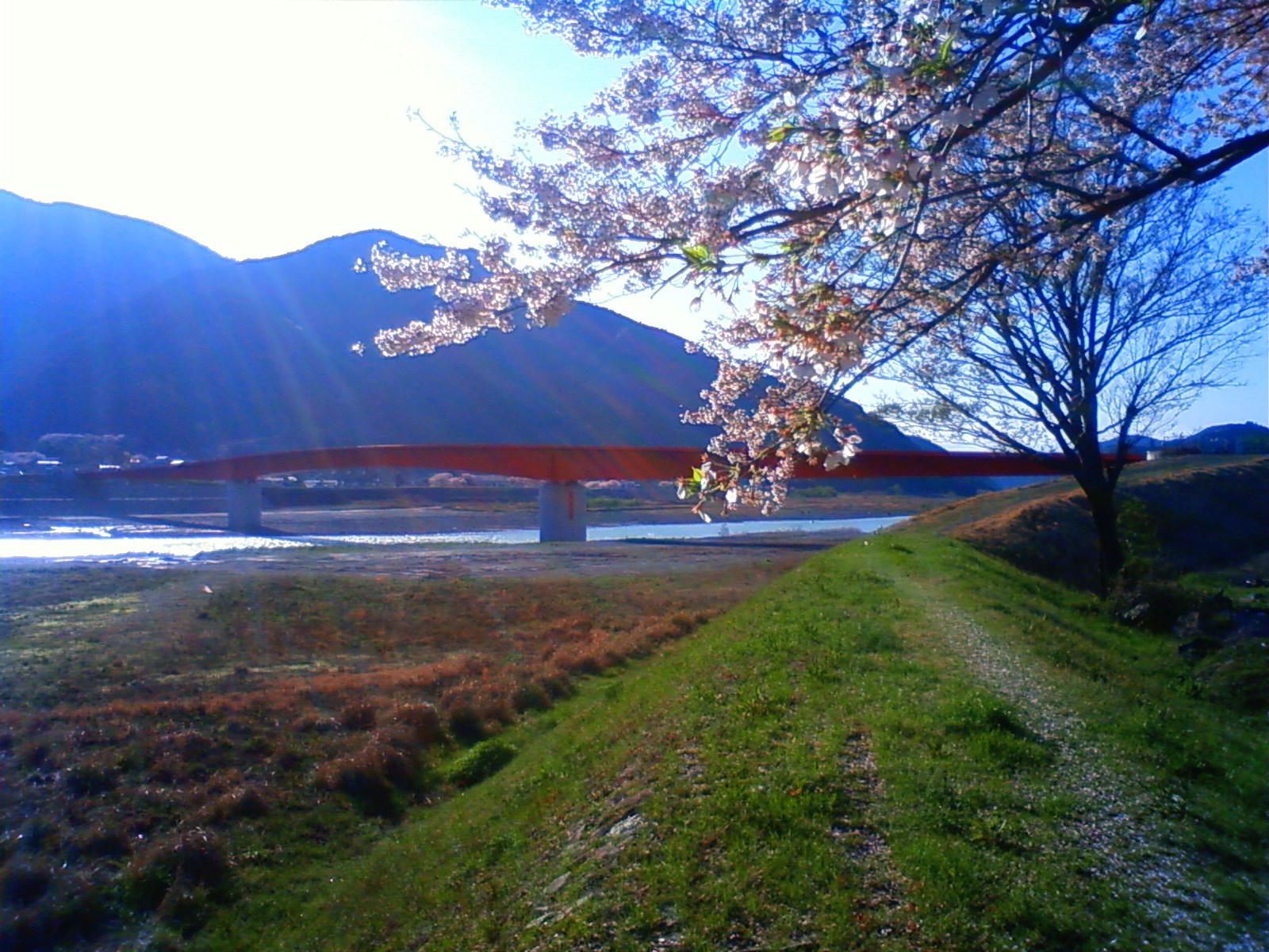 桜（新南部橋）